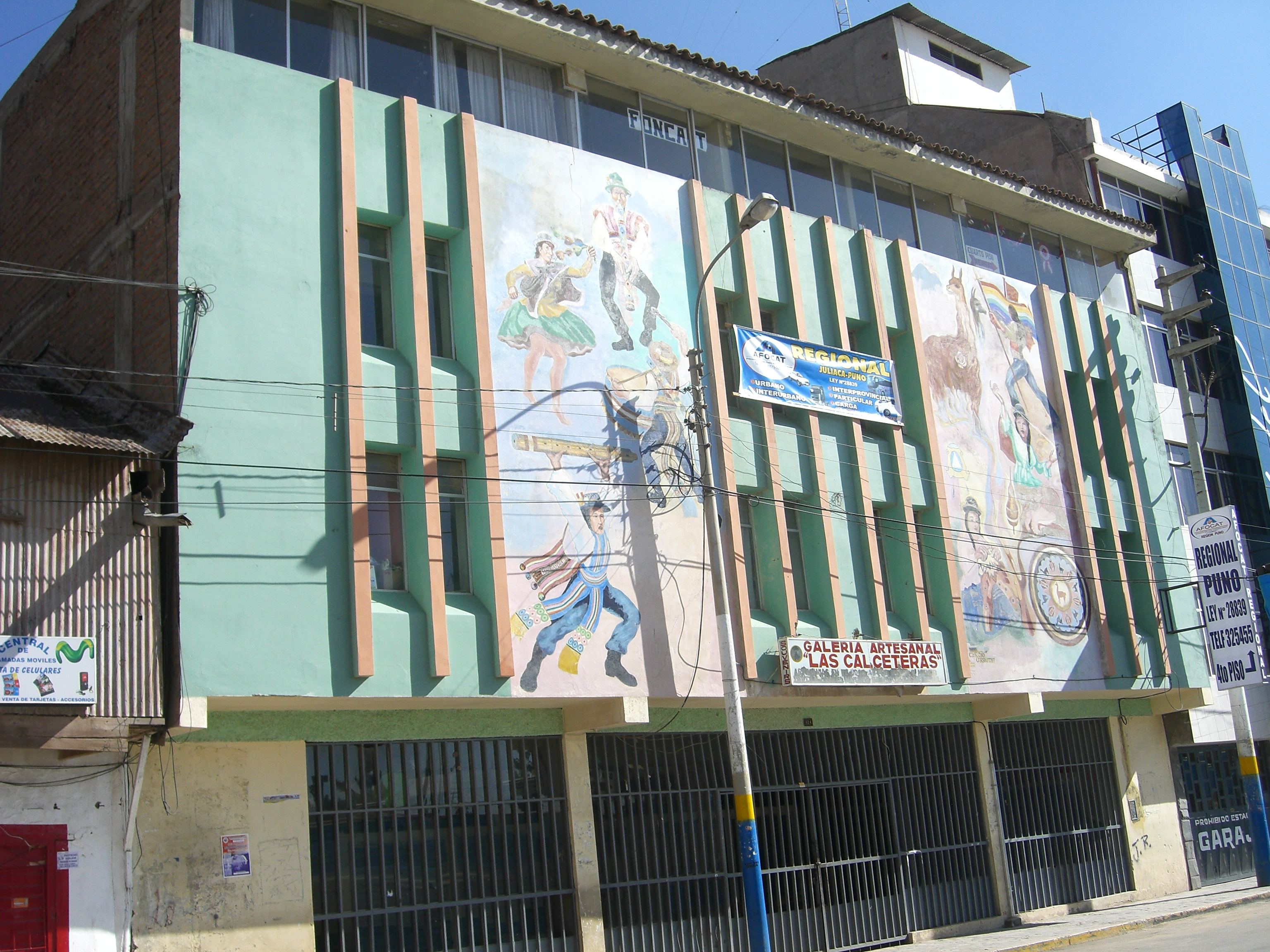 Centro Artesanal Las Calcterss ubicado en la Plaza Bolognesi Juliaca